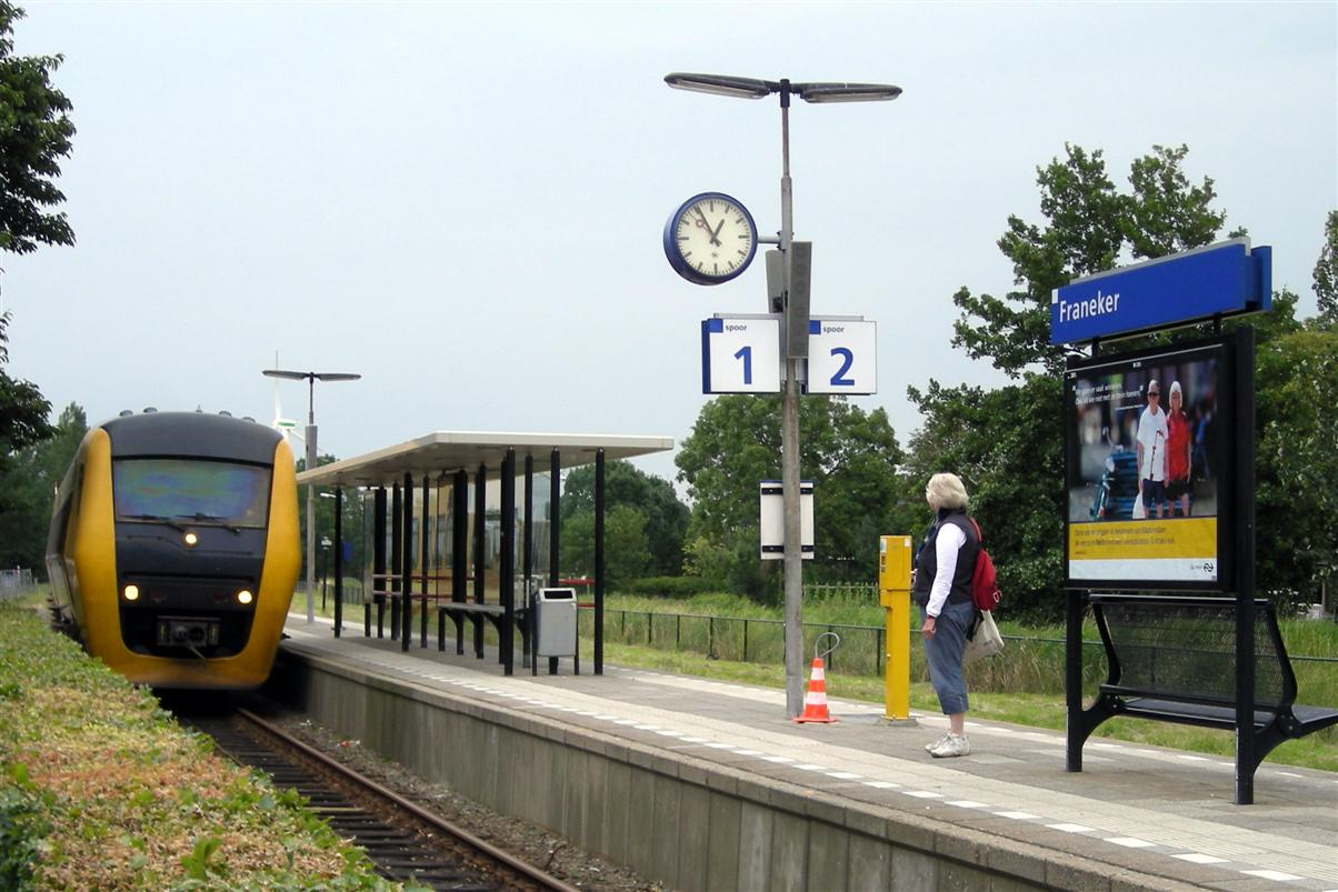 Station Franeker